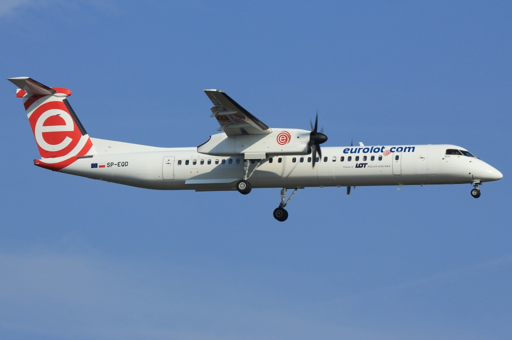 SP-EQD (cn 4411)